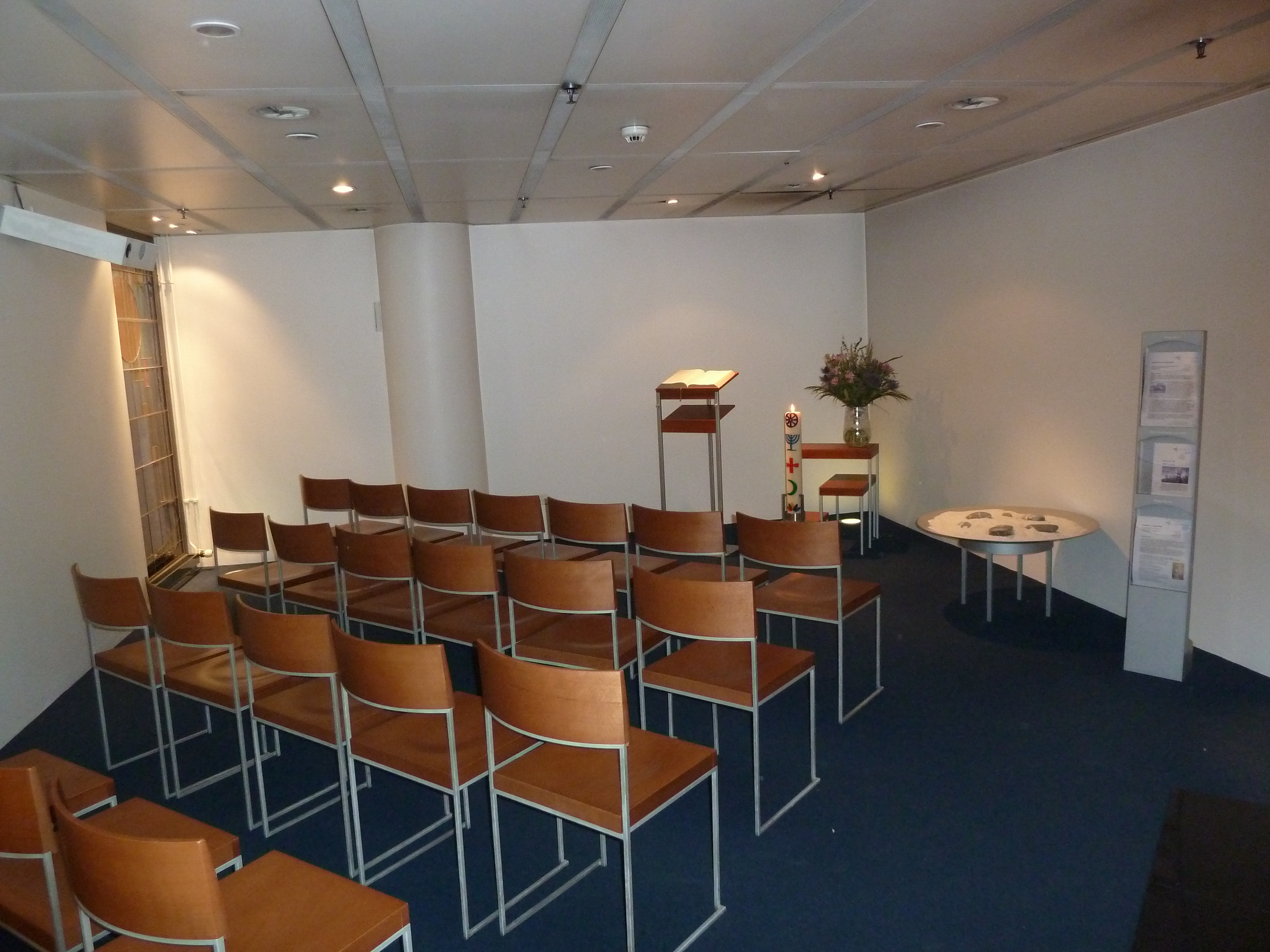 Bestuhlter Hauptraum der Zürcher Bahnhofskirche